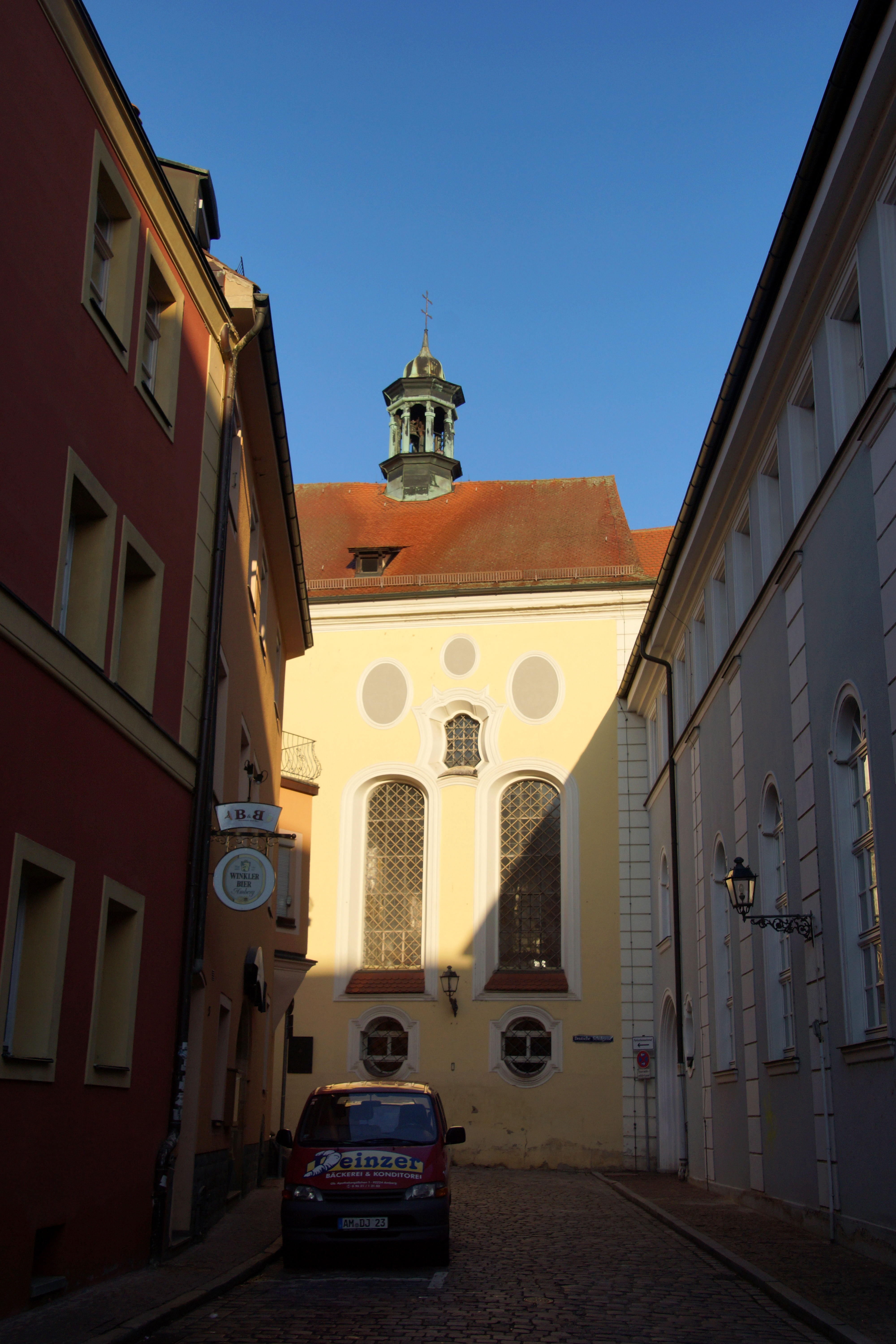 Die sogenannte Schulkirche in Amberg, eigentlich Klosterkirche St. Augustinus